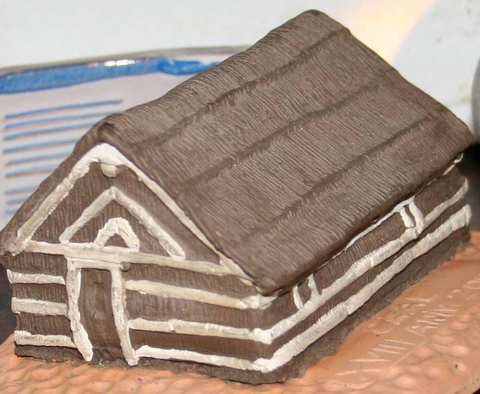 Modelo de casa de pescador